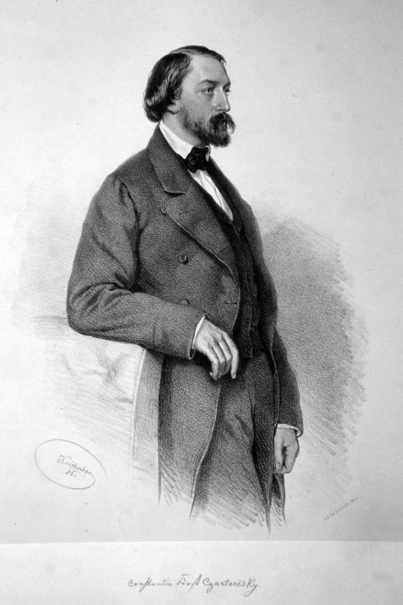 Konstantin Maria Adam Fürst Czartoryski (1822-1891), lebenslängliches Herrenhausmitglied. Lithographie von Josef Kriehuber, 1861